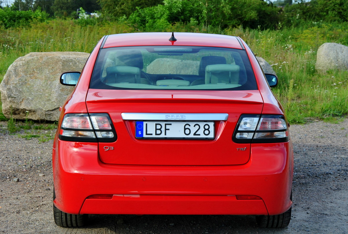 Saab 9-3 Griffin TTID 119gr (99)